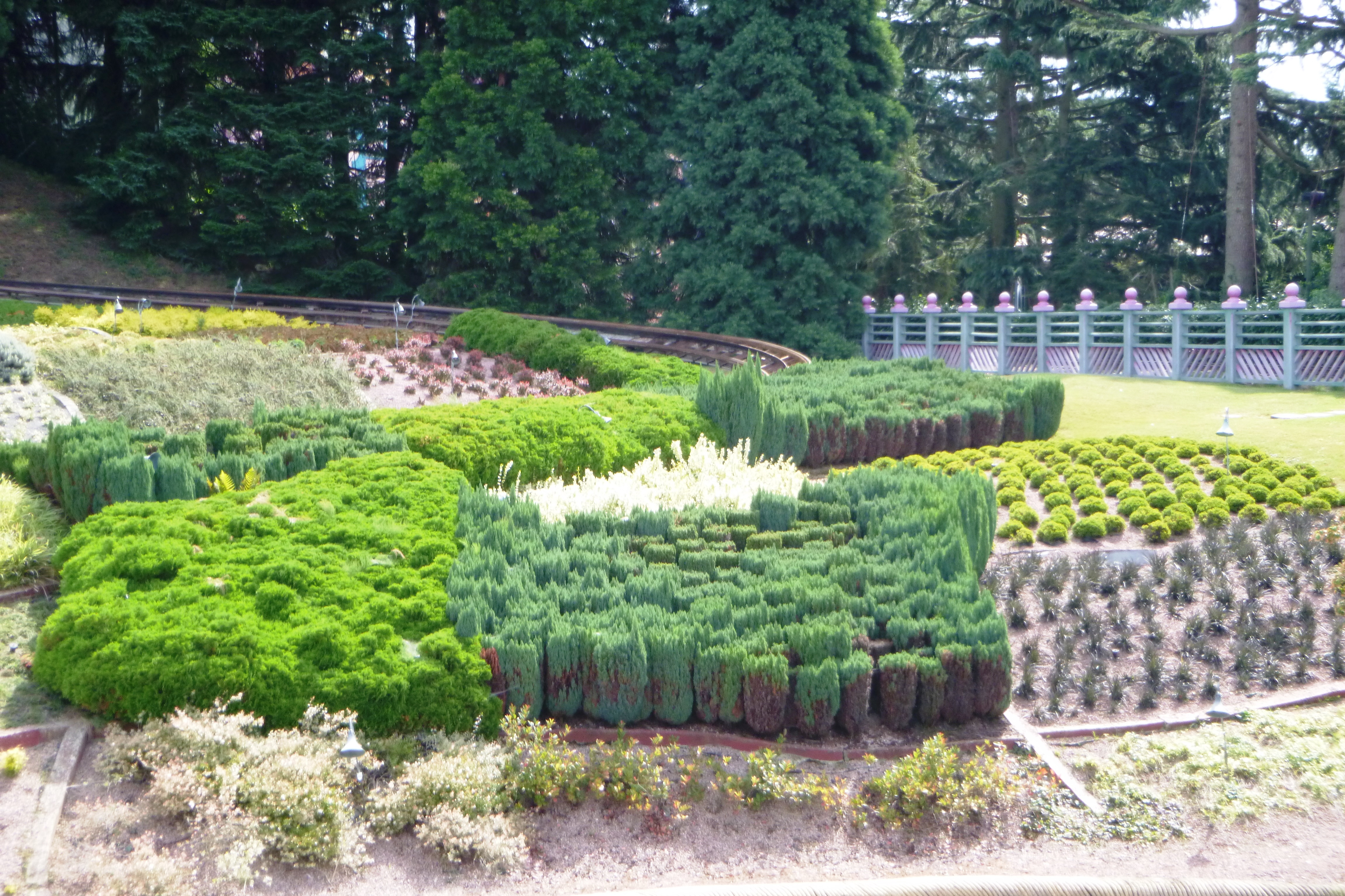 Les massifs végétaux jouxtant l'embarquement